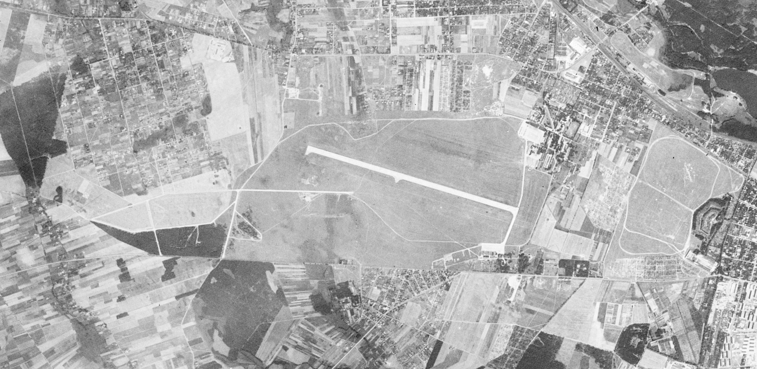 Lotnisko Poznań-Ławica (POZ-EPPO) i okolice sfotografowane przez amerykańskiego satelitę wywiadowczego KH-4A 1023, 23 sierpnia 1965 r. Widoczne jest także Wysogotowo i Przeźmierowo, a także poznańskie Jeżyce, osiedle Ławica, i dwa forty Twierdzy Poznań. Zauważalny jest brak Toru Poznań, w miejscu widocznych dróg w pobliżu pasa startowego, i powstające ogródki działkowe.